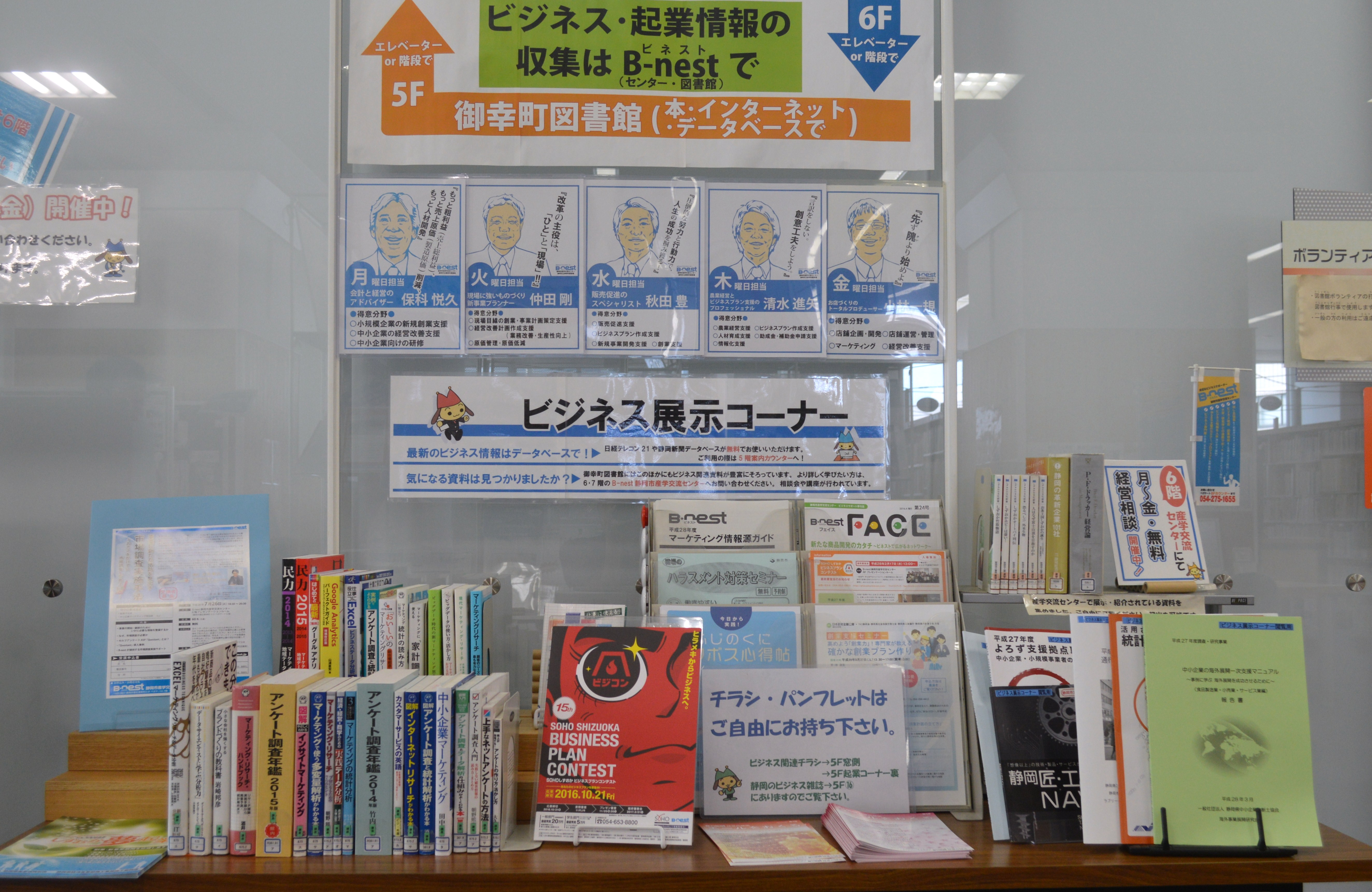 静岡市立御幸町図書館。静岡市立図書館のひとつ。